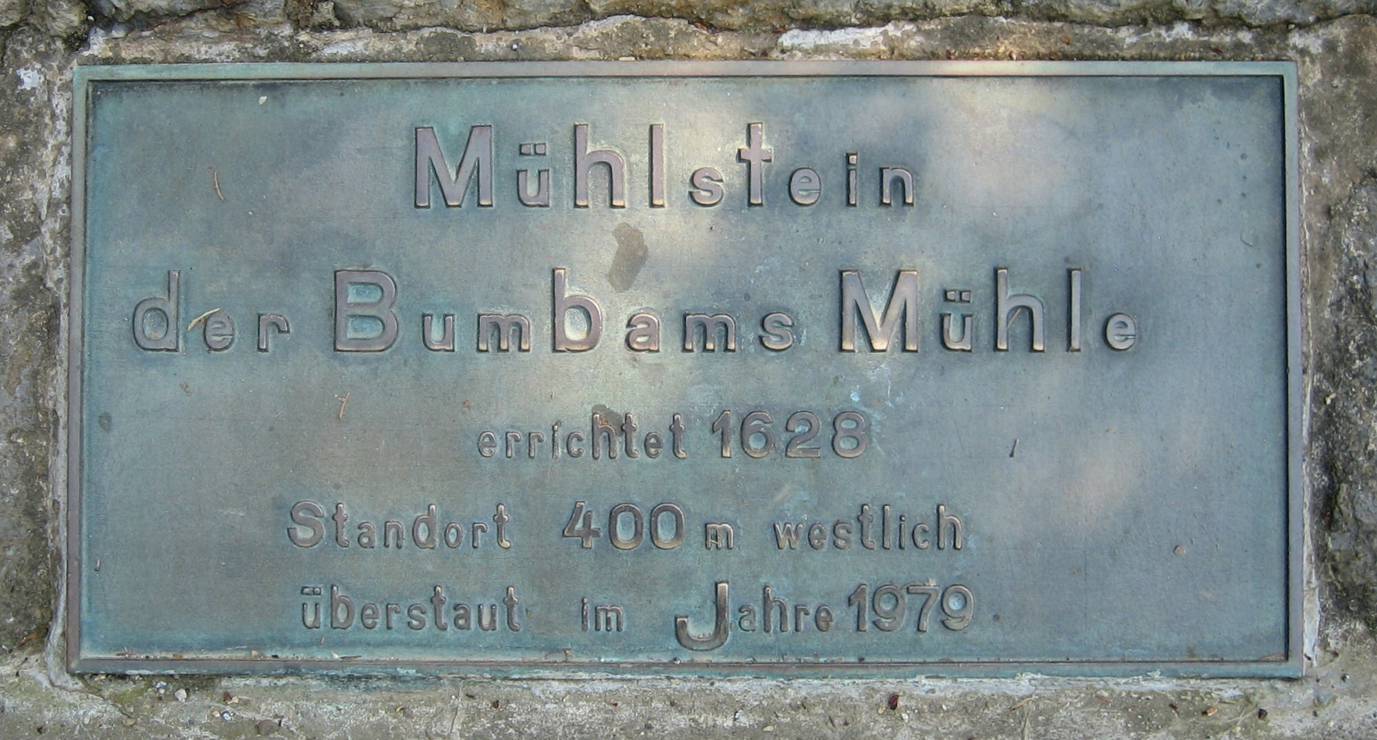 Gedenktafel für die Bumbam-Mühle an der Aabachtalsperre, Bad Wünnenberg. Bronzetafel: „Mühlstein der Bumbams Mühle – errichtet 1628 – Standort 400 m westlich – überstaut im Jahre 1979“.